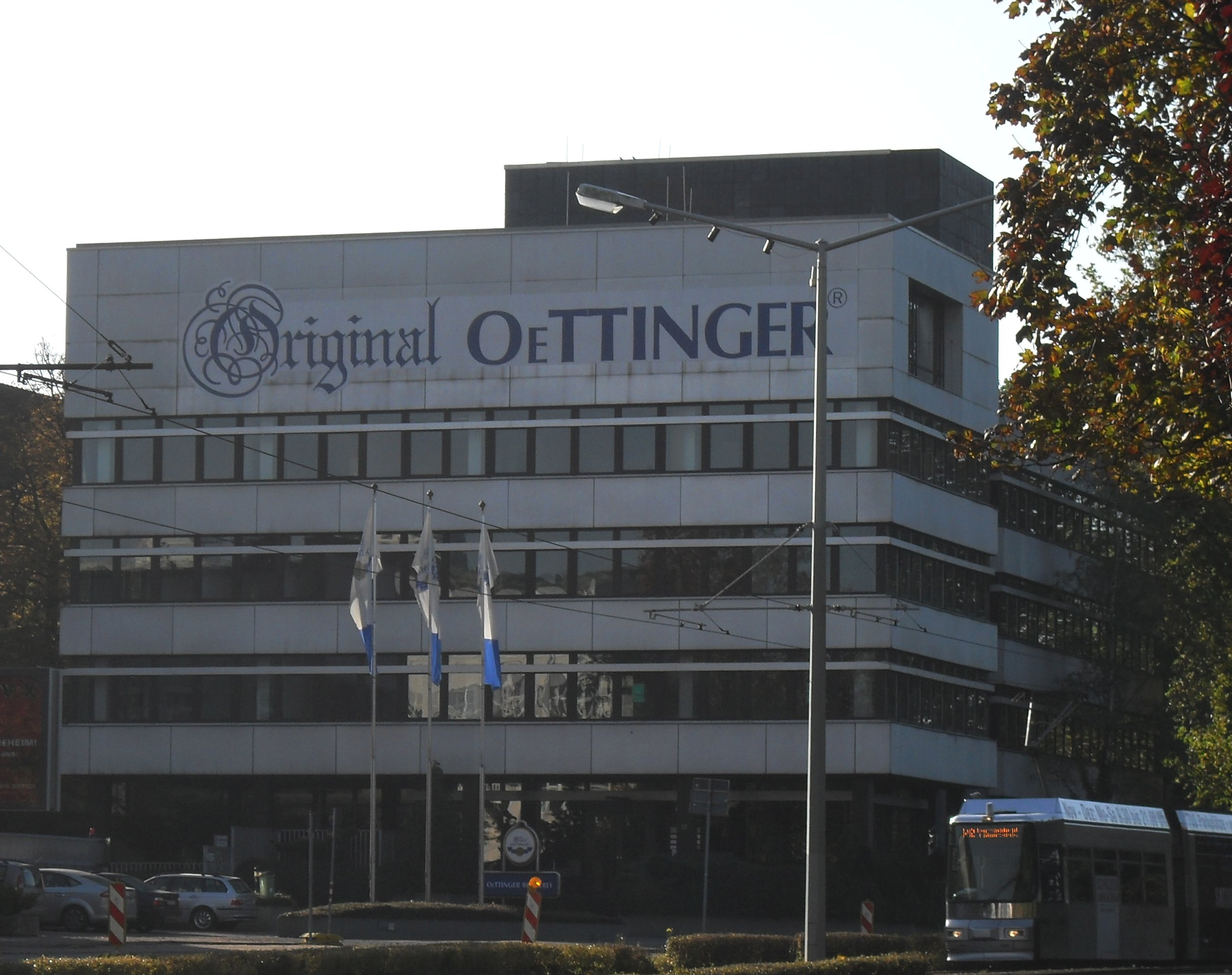 The Brauerei Braunschweig (Braunschweig Brewery) of the Oettinger Group